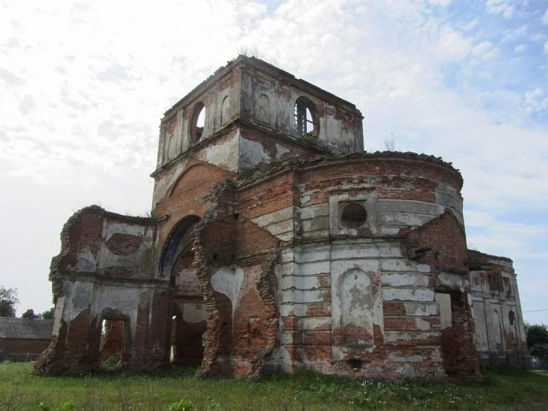 Леніна, Добрушскі раён Гомельскай вобласці. Выгляд Свята-Мікалаеўскай царквы з боку апсіды